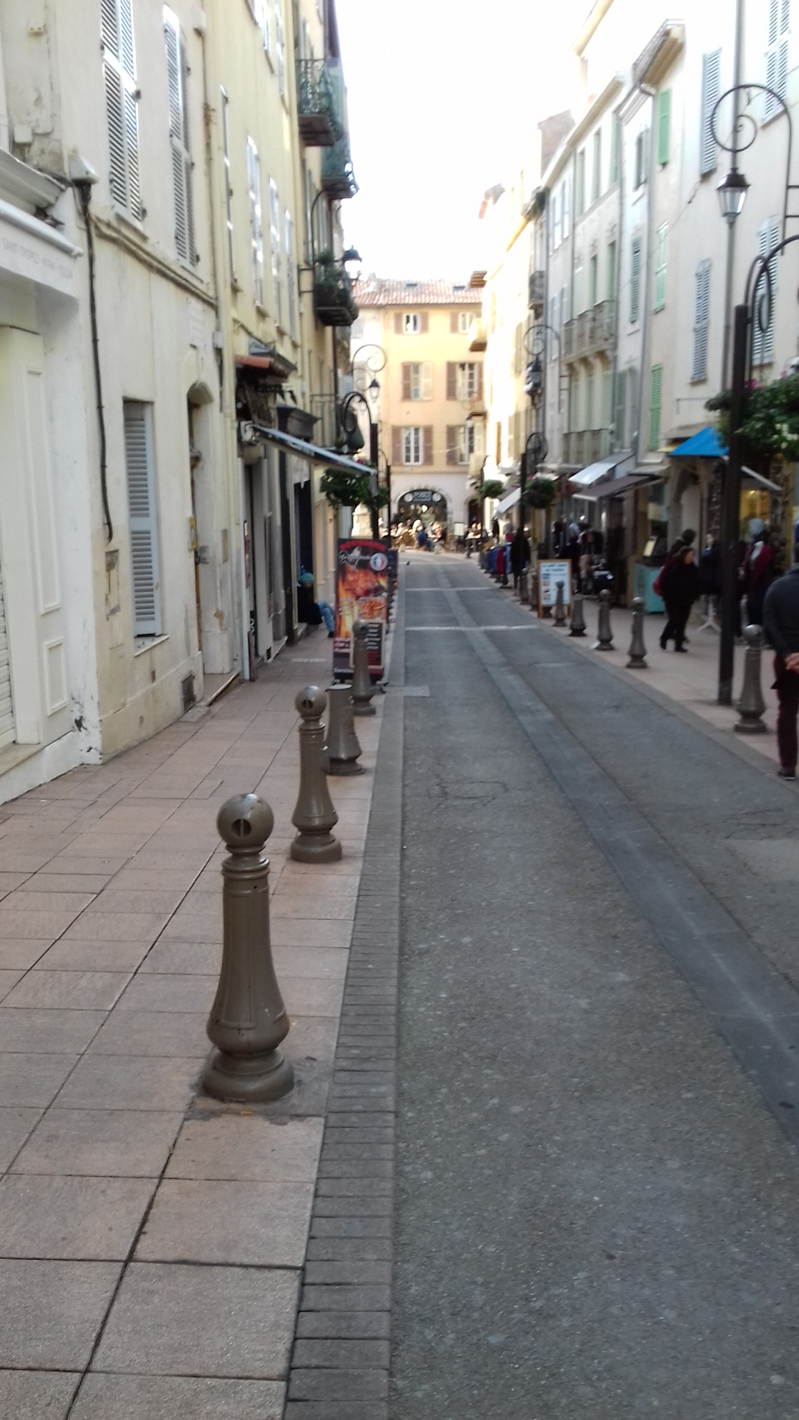 dans les rues d'Antibes